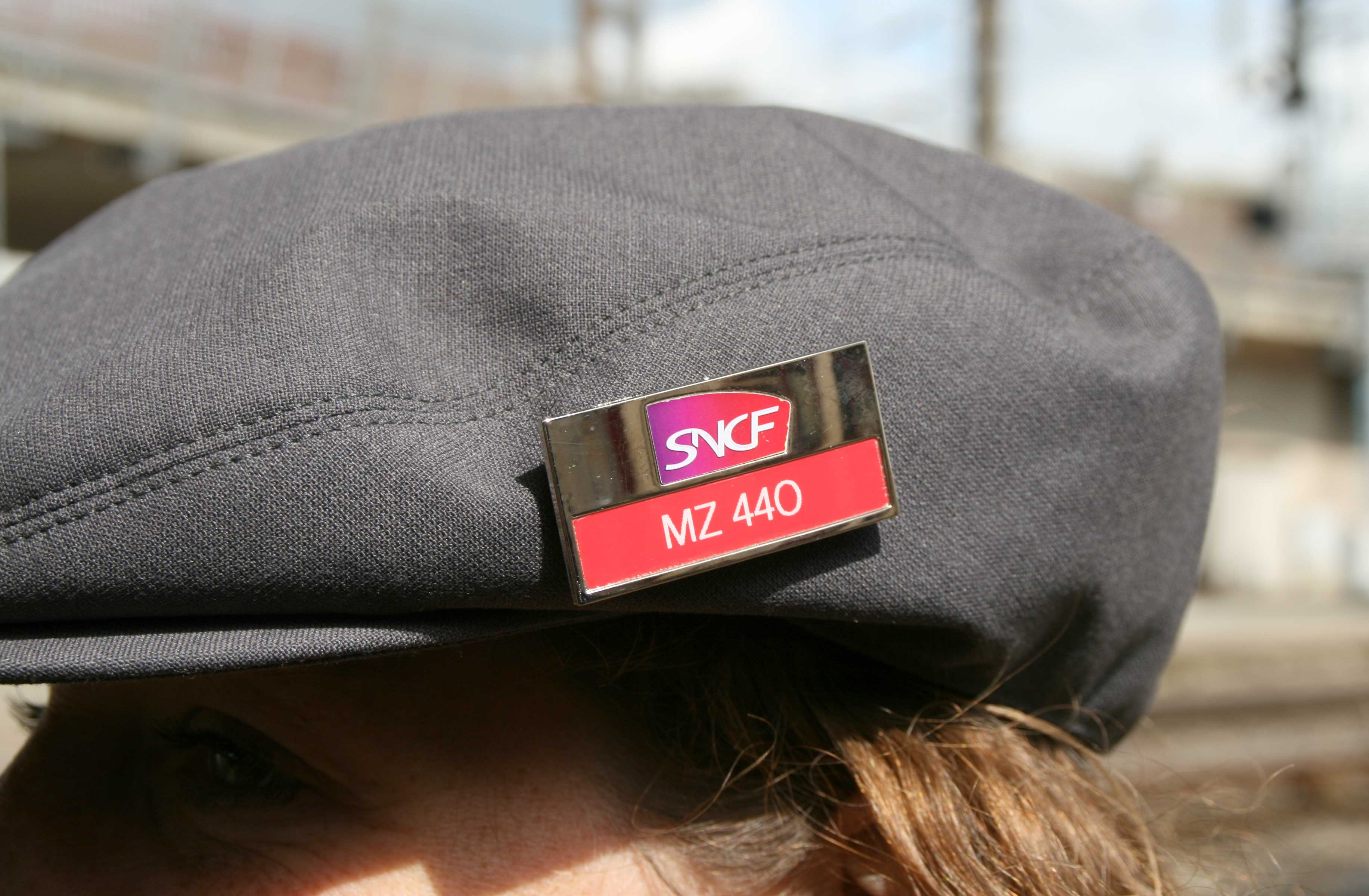 Kap SNCF-Kontroller. Eege Foto vum mat engem Merci un déi frëndlech Joffer, déi sou gutt stallgehalen huet.